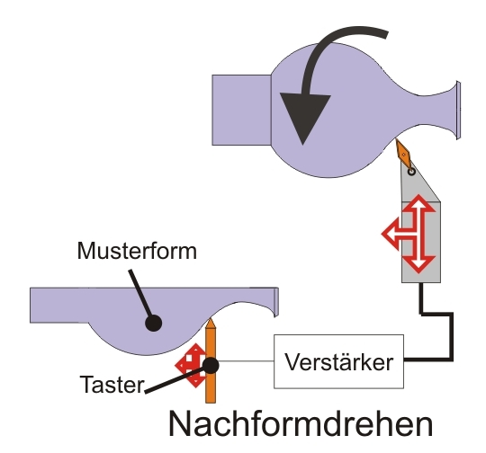 Nachformdrehen